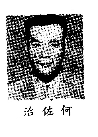 中文（中国大陆）: 制憲國民大會代表